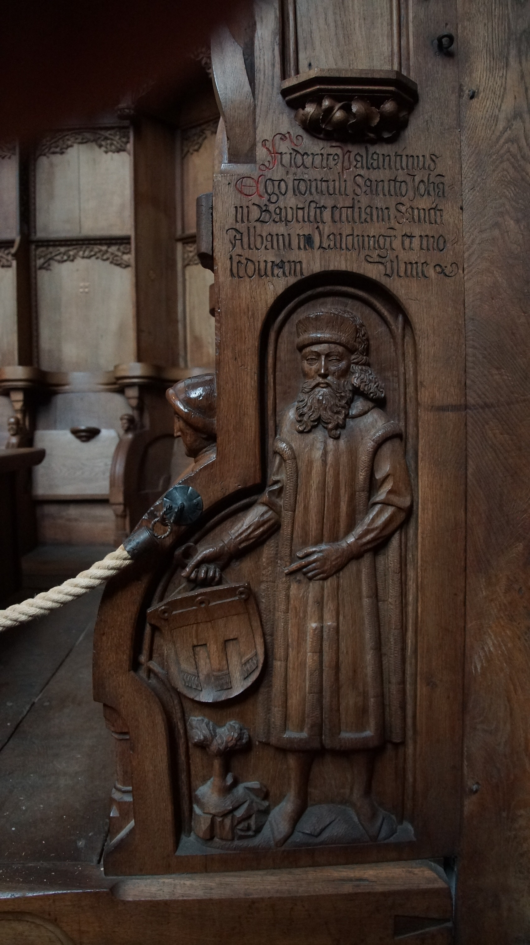 "Fridericus Palatinus. Ego contuli sancto Johani Baptiste eccl(es)iam Sancti Albanis in Laichinge(n) et mole(n)dinam Ulme."